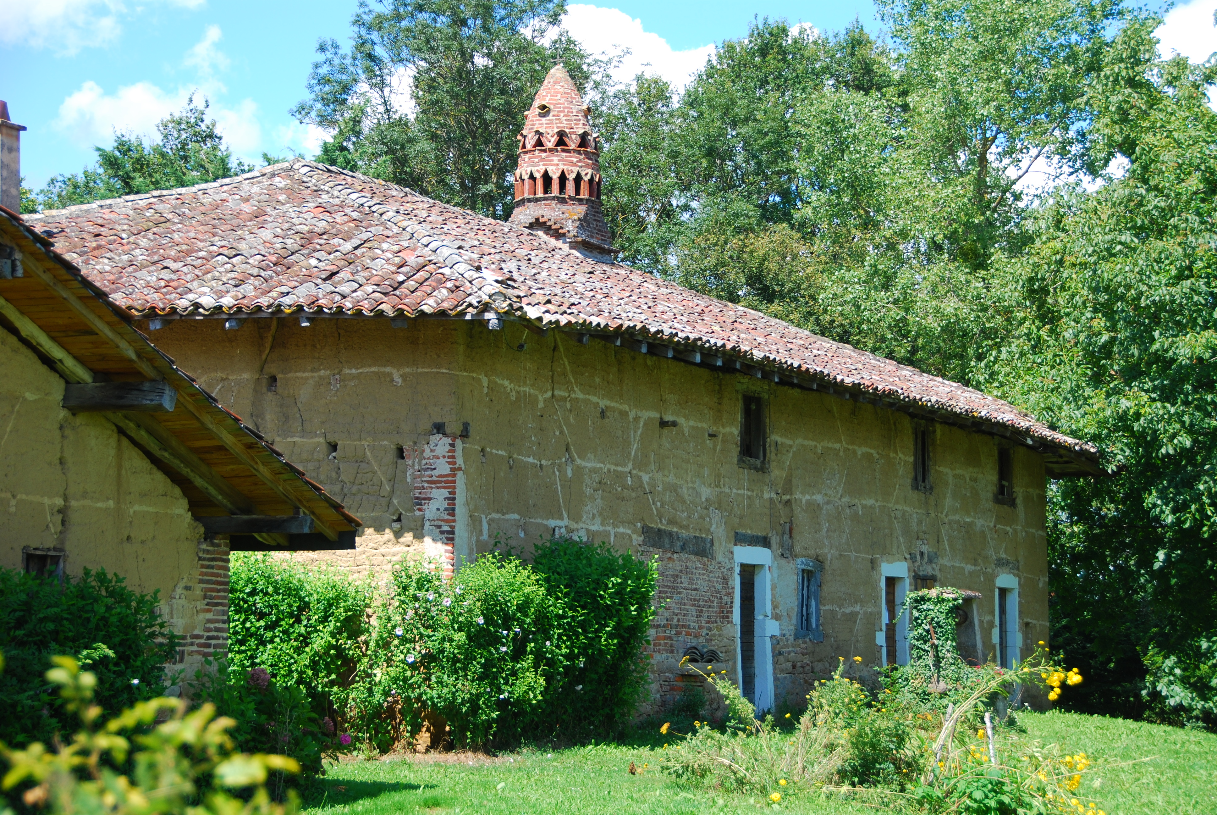 Ferme de Pérignat, Pérignat (Classé, 1981) .